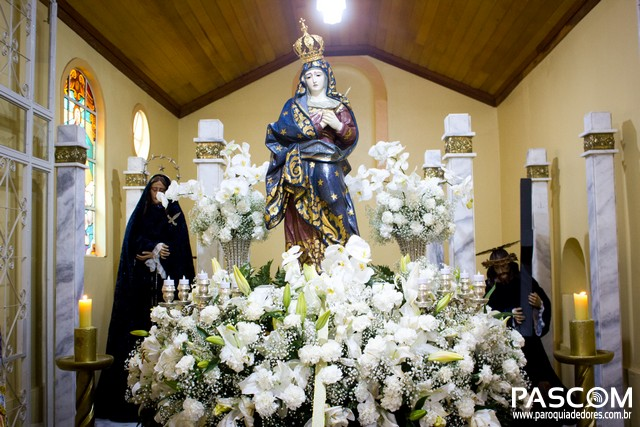 Nossa Senhora das dores em seu majestoso andor.